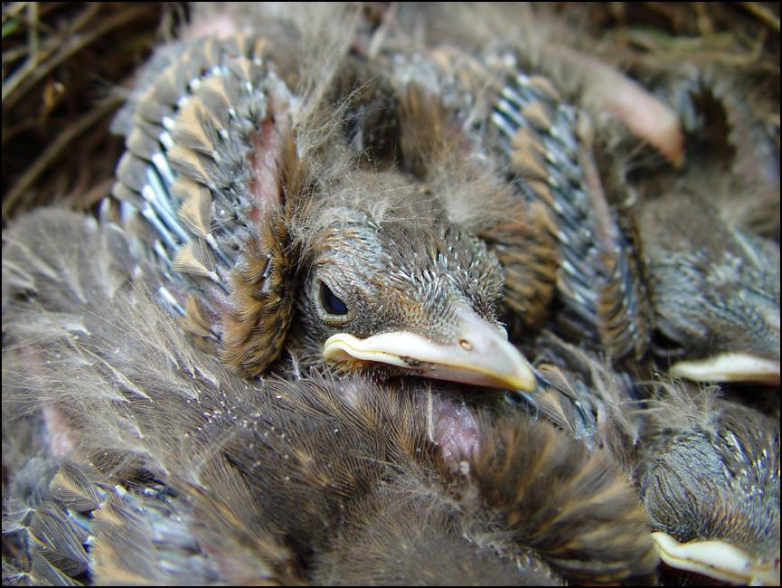 Beschreibung: Amselküken Aufnahmedatum: 25. Juni 2002 Fotograf: ArtMechanic